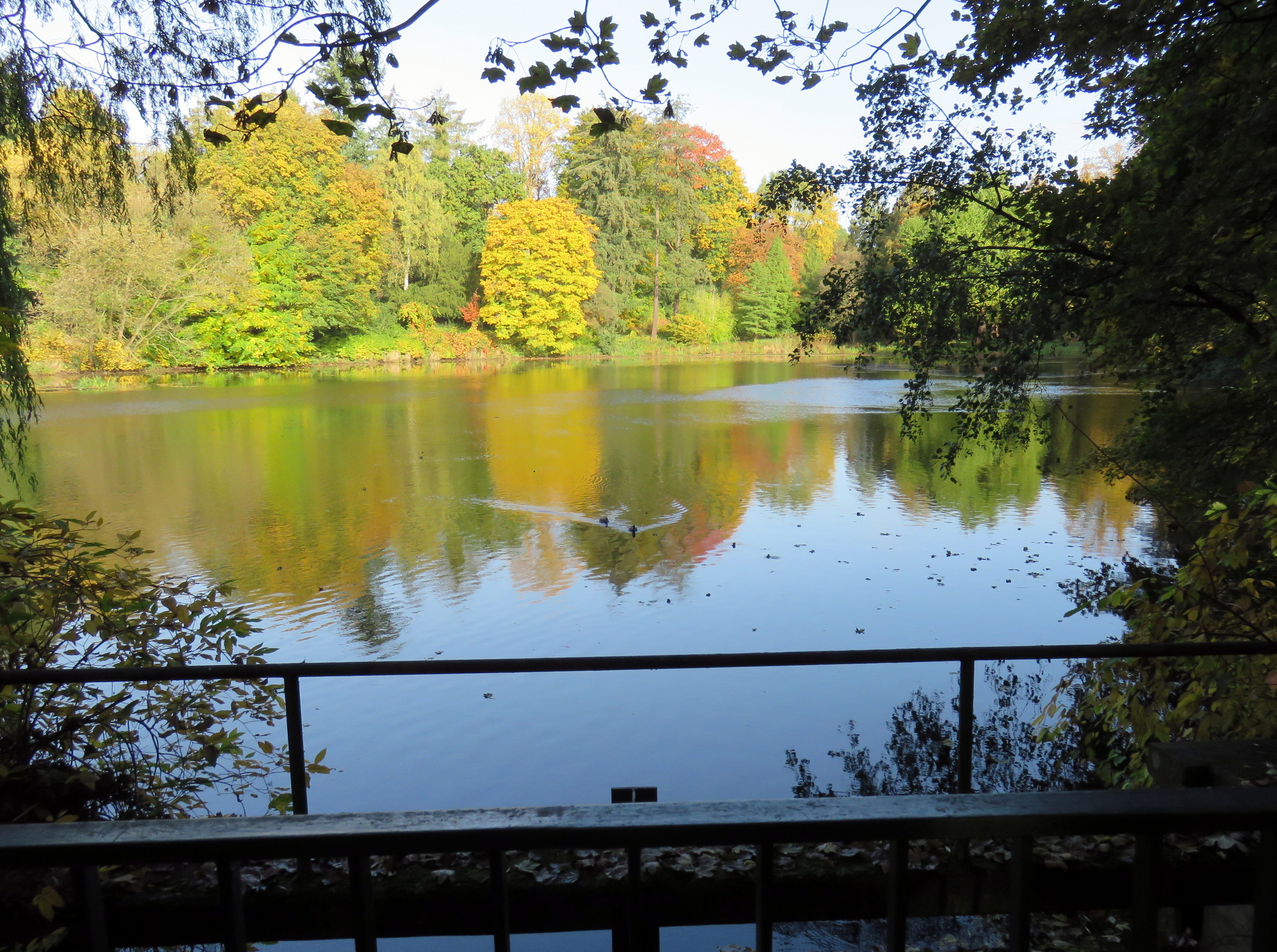 Vor der Poppenbütteler Schleuse aufgestaute Alster am Alsterwanderweg (LSG „Hummelsbütteler Feldmark/Alstertal“) im Stadtteil Hamburg-Poppenbüttel mit Arboretum "Park Marienhof". Blick vom Wehr am Alsterwanderweg.